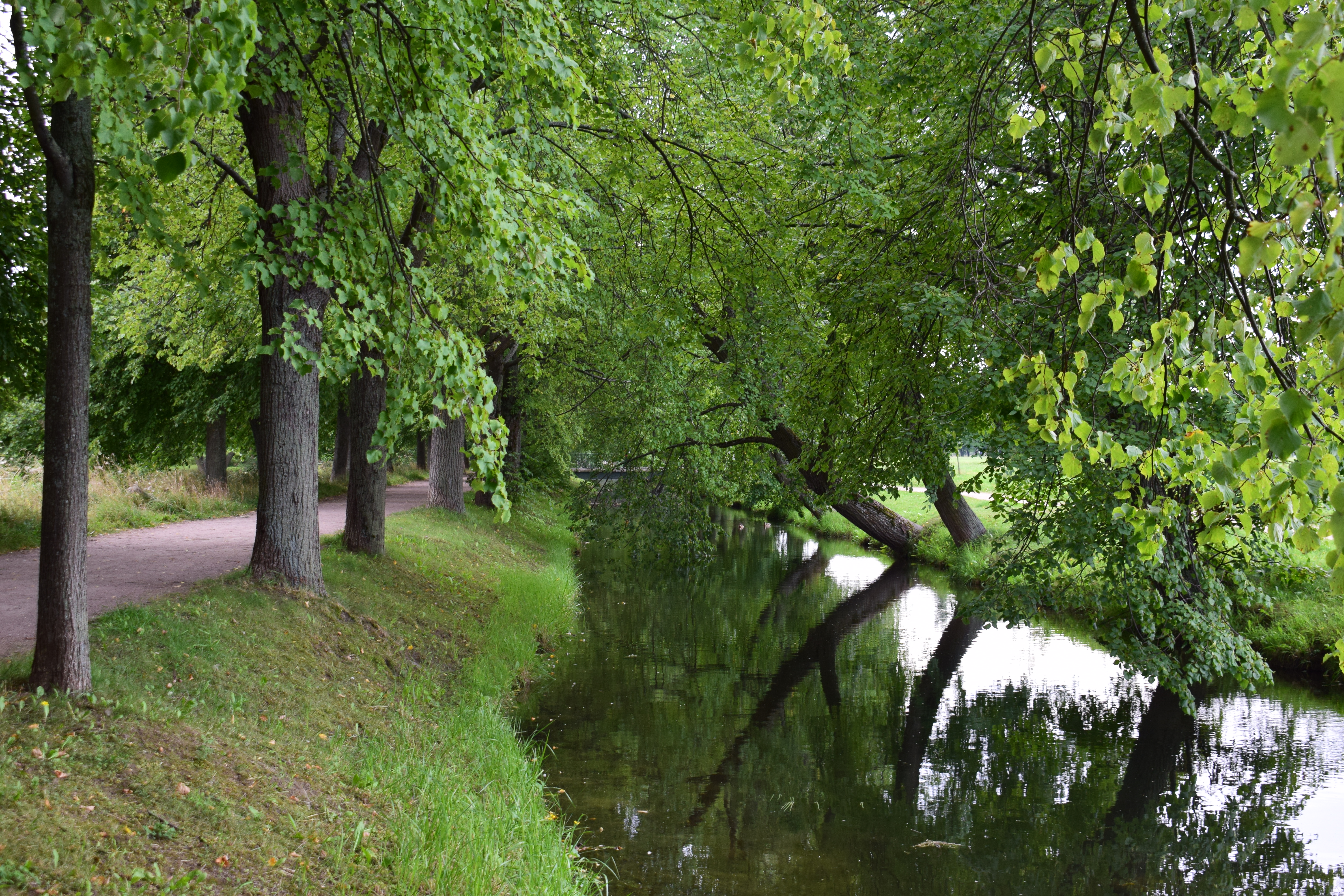 Сампсониевский водовод в Колонистском парке Петергофа, Санкт-Петербург